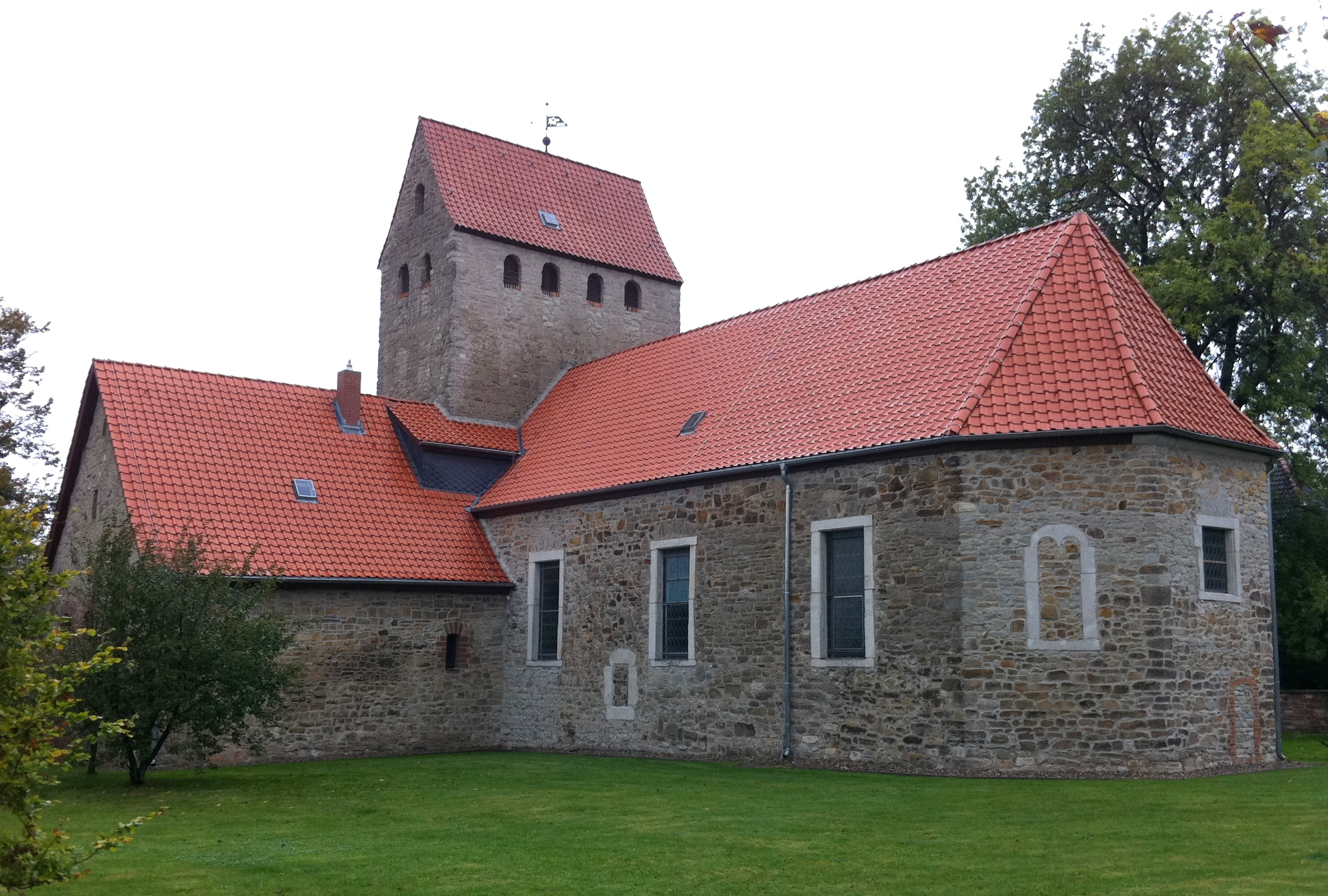 Sankt-Marien-Kirche Hakenstedt